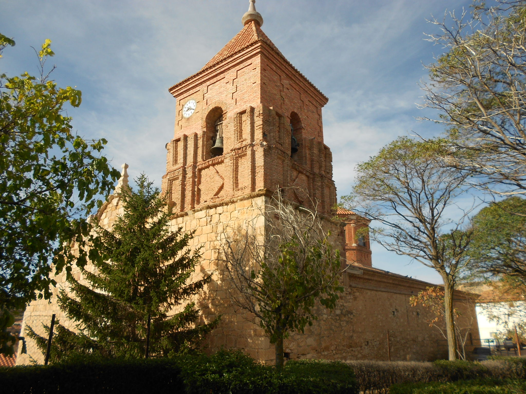 Iglesia parroquial de Nuestra Señora del Pilar (Ojos Negros, España)